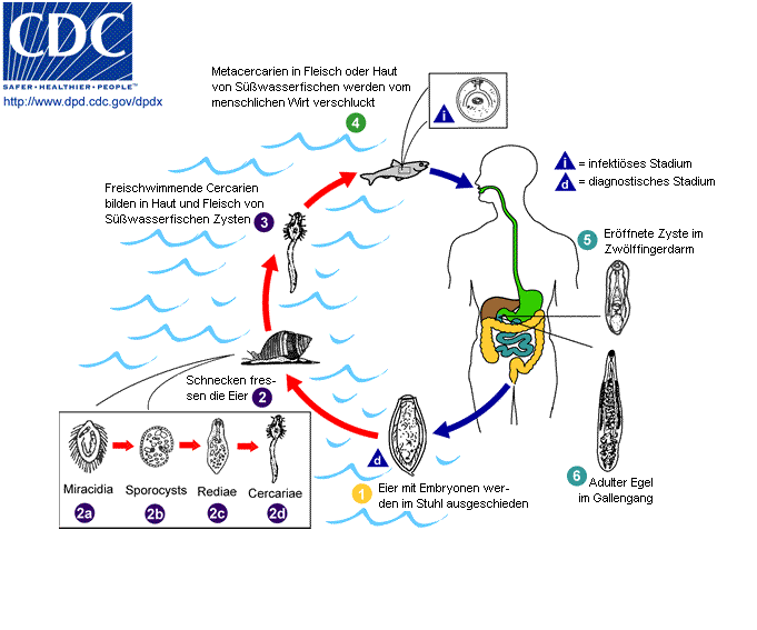 Zebenszyklus des Chinesischen Leberegels